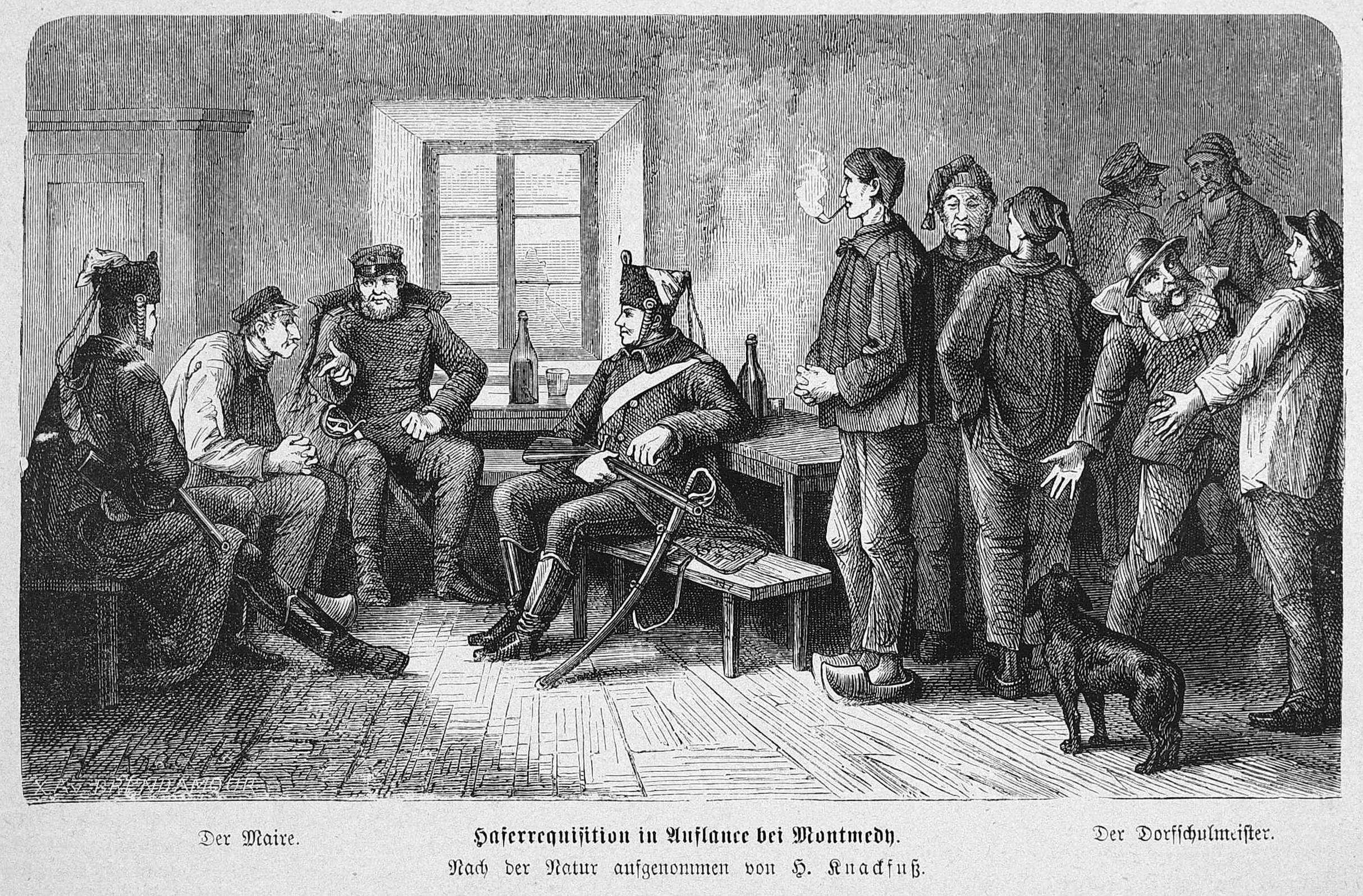 Bild von Seite 097 der Zeitschrift Die Gartenlaube. Image from page 097 of journal Die Gartenlaube, 1871.